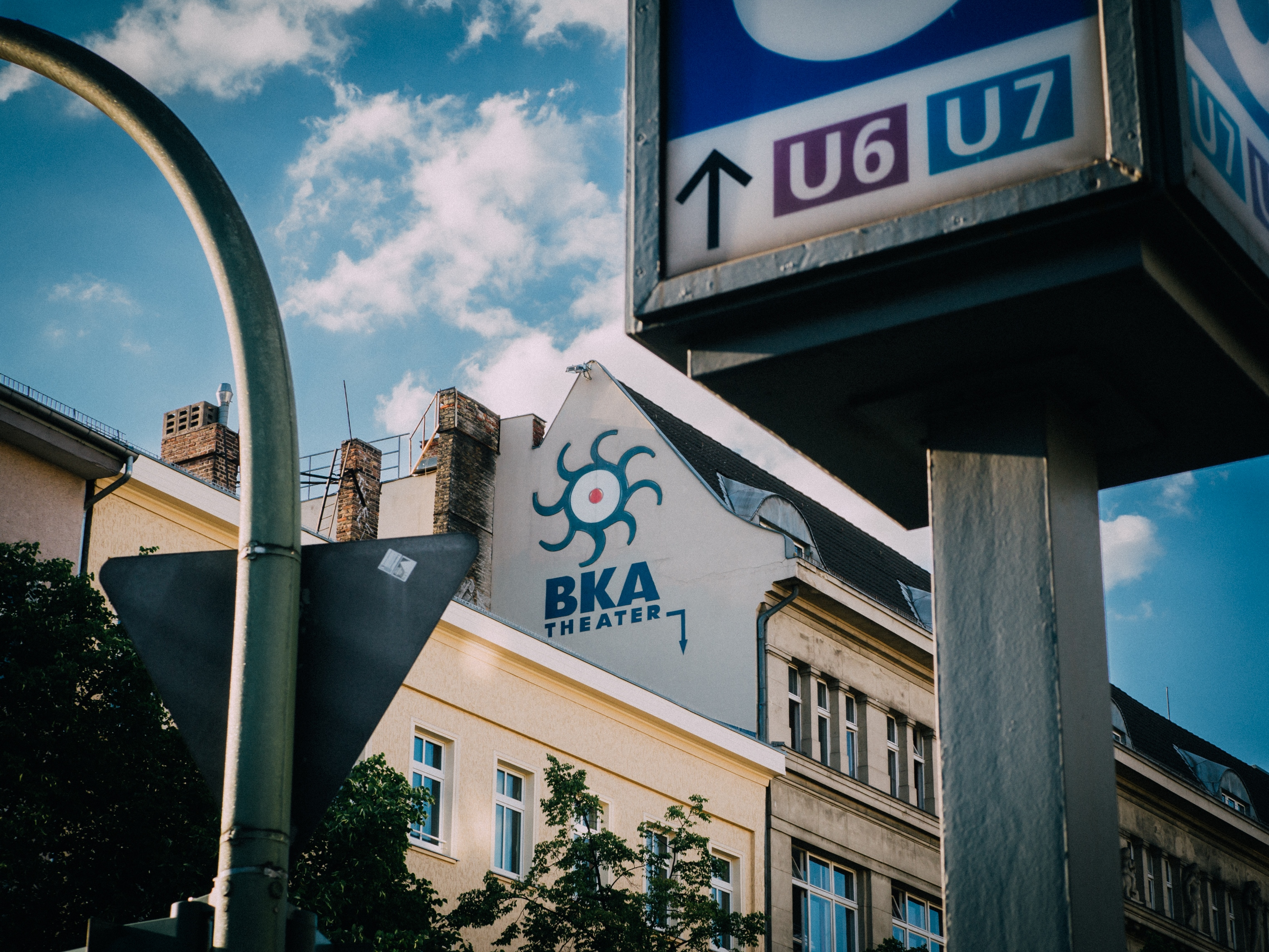 BKA Theater Außenansicht